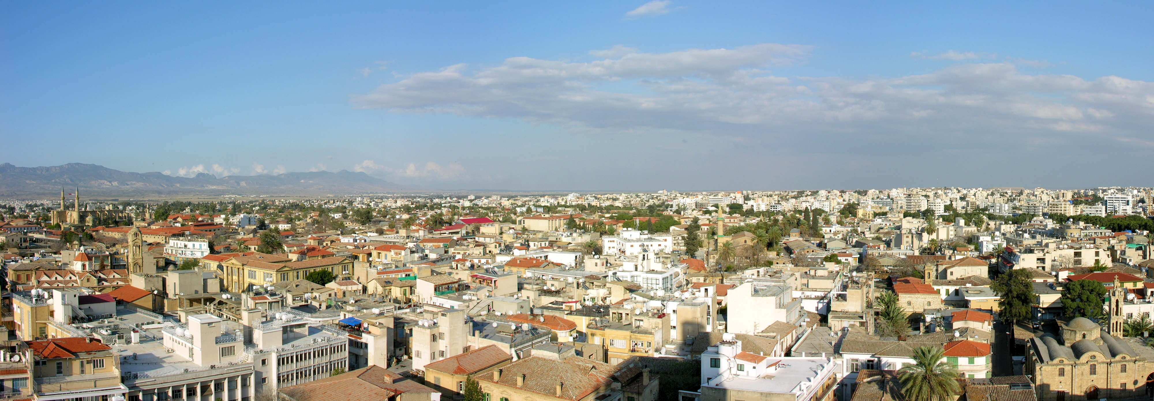 Cyprus, Nicosia